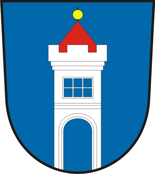 Znak městysu Katovice.